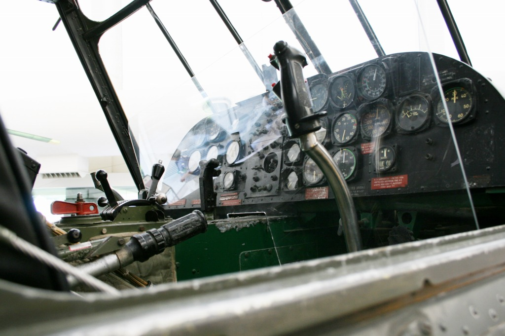 H-19